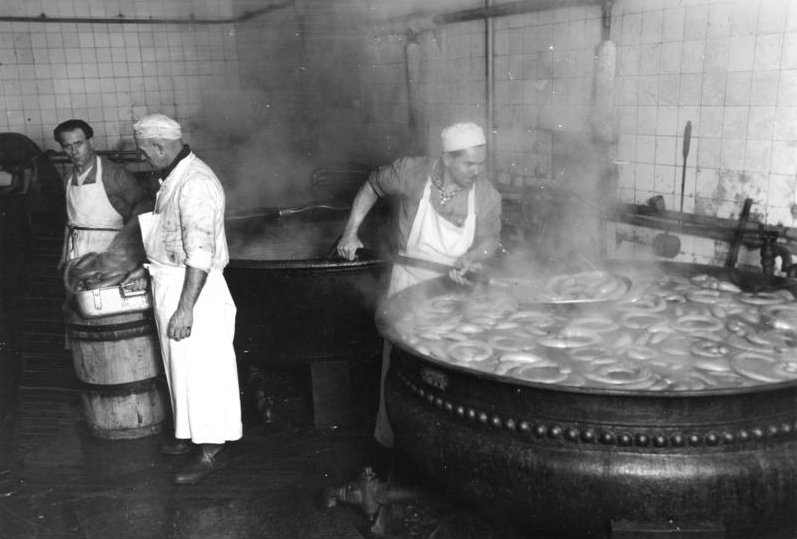 Berlin, Kochen von Leberwurst Illus-Bittner Versorgung Berlins. 2.2.48 Auch der Konsum ist in die Versorgung Berlins stark mit eingeschaltet. U.B.z.: Das Kochen von Leberwurst. 1122-48